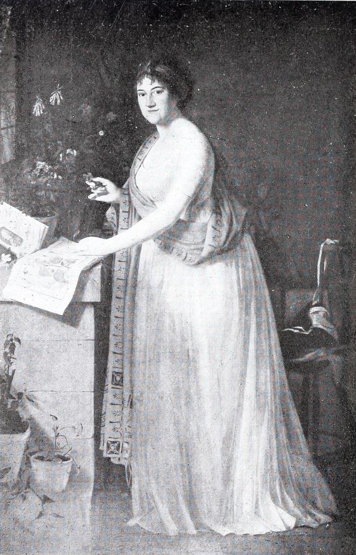 Jacques-Louis DAVID (attribué à) (1748-1825) « Portrait de Madame Calès » M. O. 331. Toile. – H. 1m 92 ; L. 1m 30. – Don de M. Poupardin, 1860. En pied, debout, la tête de trois quarts, tournée à gauche, vêtue d'une robe blanche qu'entoure une écharpe rouge, madame Calès tient de la main droite une fleur, et sa main gauche est posée sur un livre de botanique renfermant la gravure d'une plante au bas de laquelle on lit : « Sida crastifolia, P. S. Redouté, del. » Au-dessus de cette gravure, dans un livre entr’ouvert, à la première page, est le portrait de J. Calès, auquel est joint le titre suivant : « Les genres des plantes de Ch. Linné », traduit par J. M. C....nierre (sic), édition en 2 volumes, première partie, à Paris, l'an VII de la République. Donné au Musée par M. Poupardin, le 20 septembre 1860. Marie -Sylphide Chardon, née à Sedan, mariée en premières noces à Gabriel-Etienne Poupardin du Rivage, d'Orléans, et en secondes noces à Jean-Marie Calès, député à la Convention nationale. Ce portrait, donné an Musée par la famille Poupardin, a été peint par David, collègue de Calès à la Convention ; l'artiste avait offert son travail à son modèle : c'est du moins ce qui est de tradition dans la famille Poupardin. Ces détails ont été communiqués, au mois d'août 1873, par M. Poupardin, directeur des domaines à Bar-le-Duc.